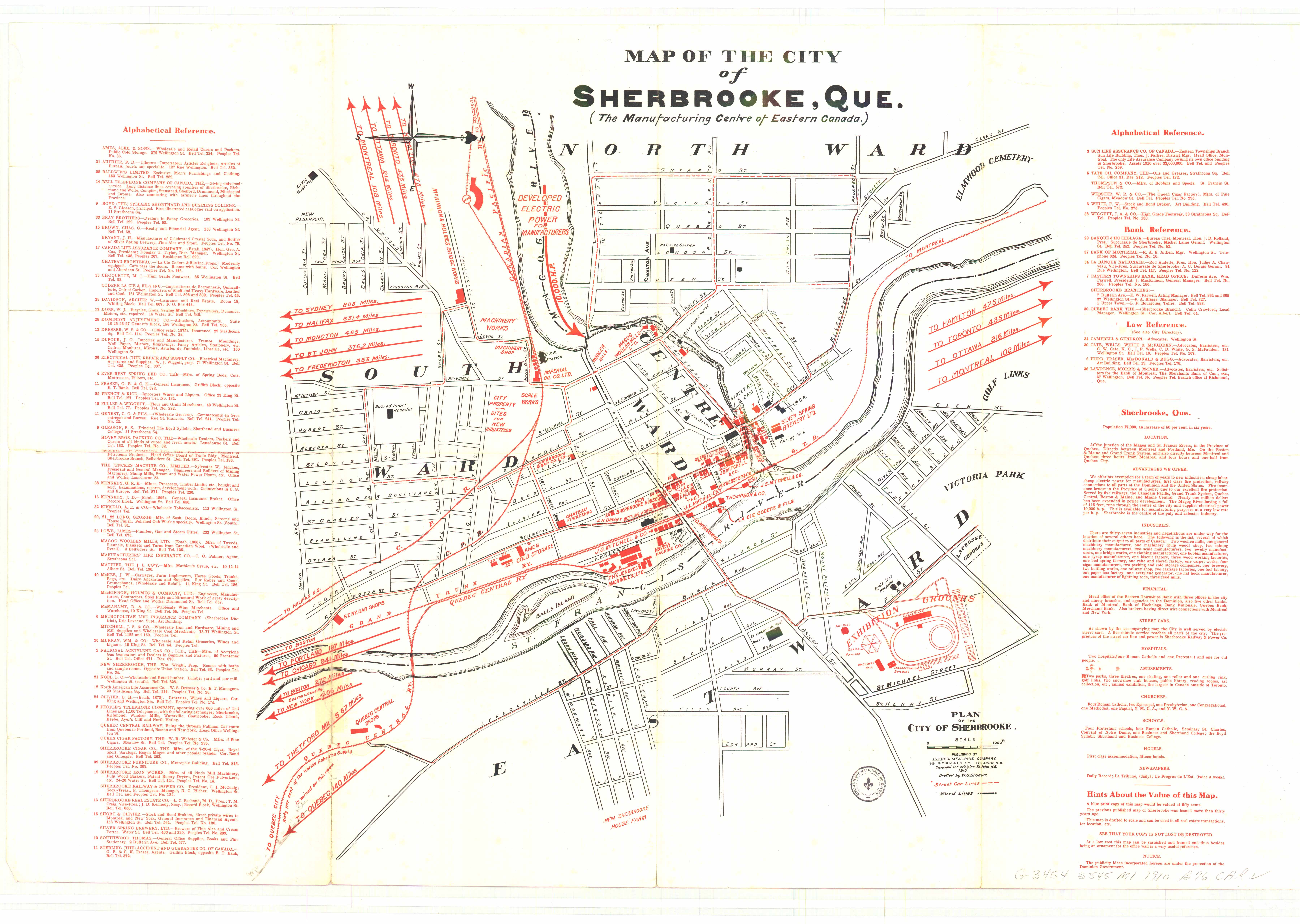 Plan de Sherbrooke en 1910